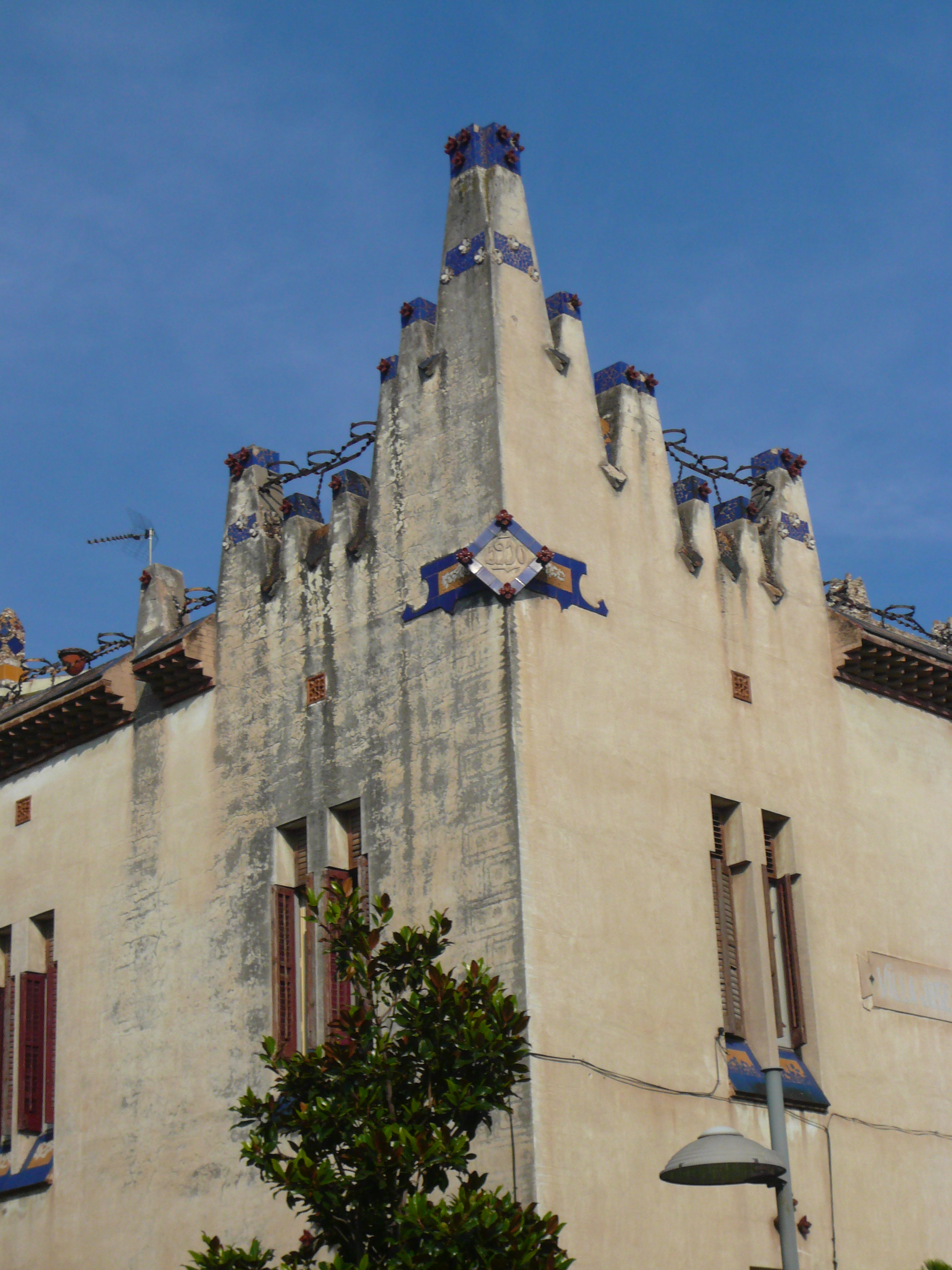 Vil·la José, Casa Anzizu. Pg. Canalies, 10 (Sant Joan Despí). Object location41° 22′ 05.1″ N, 2° 03′ 36.04″ E